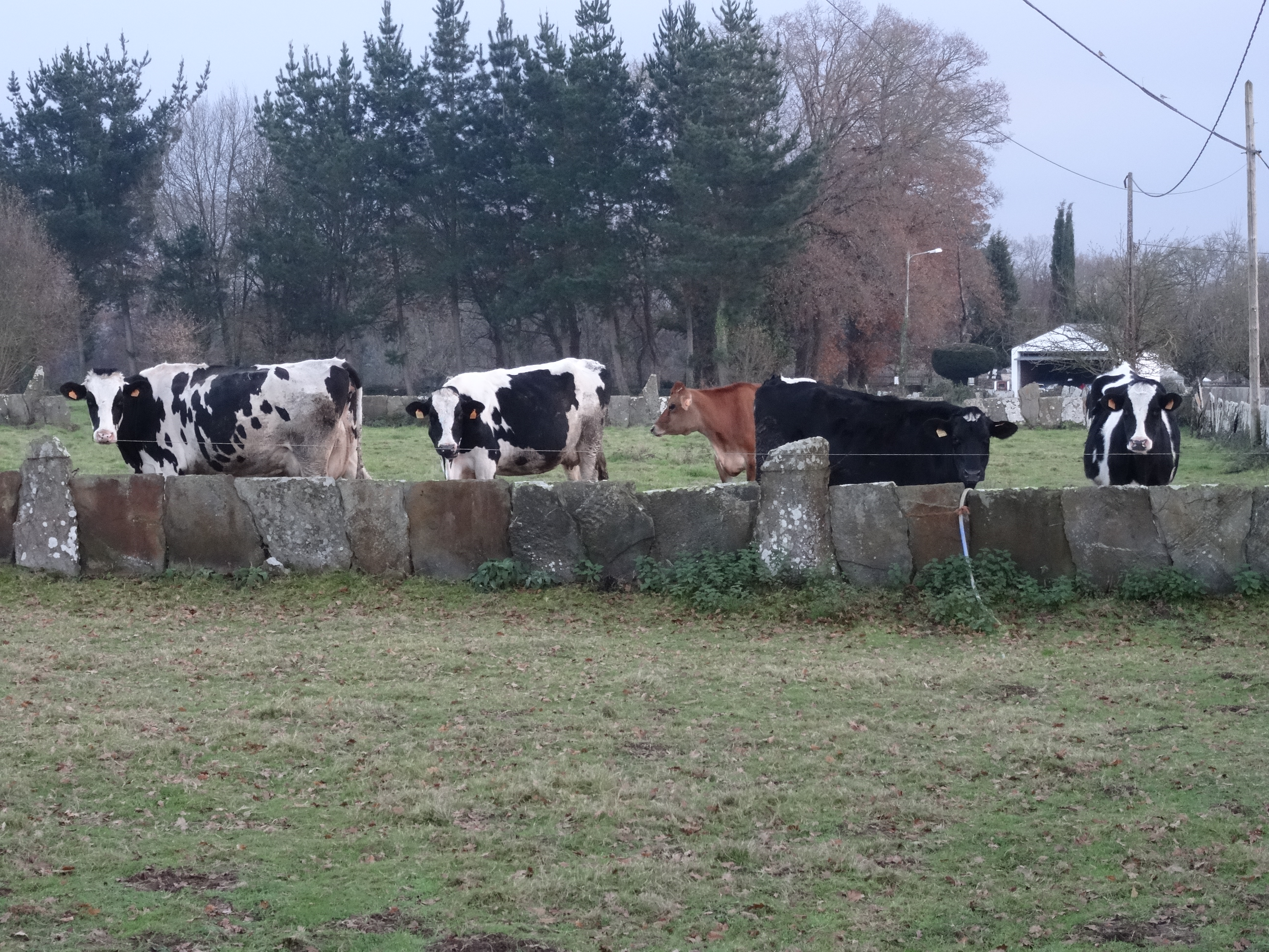 Ver título.